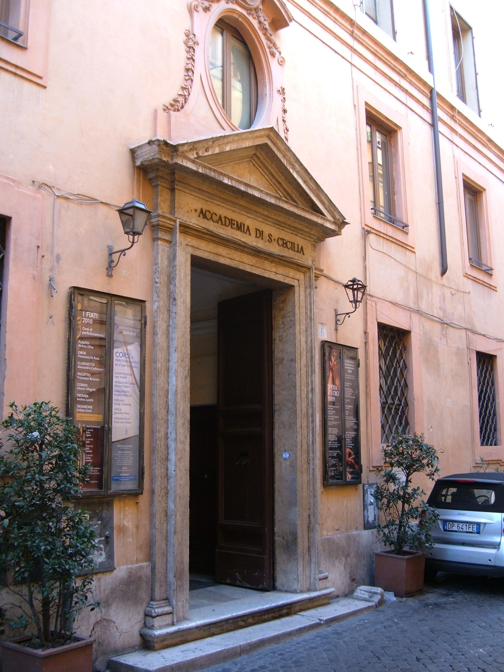 Ingresso dell'Accademia di Santa Cecilia, a Roma, in via Vittoria (rione Campo Marzio).